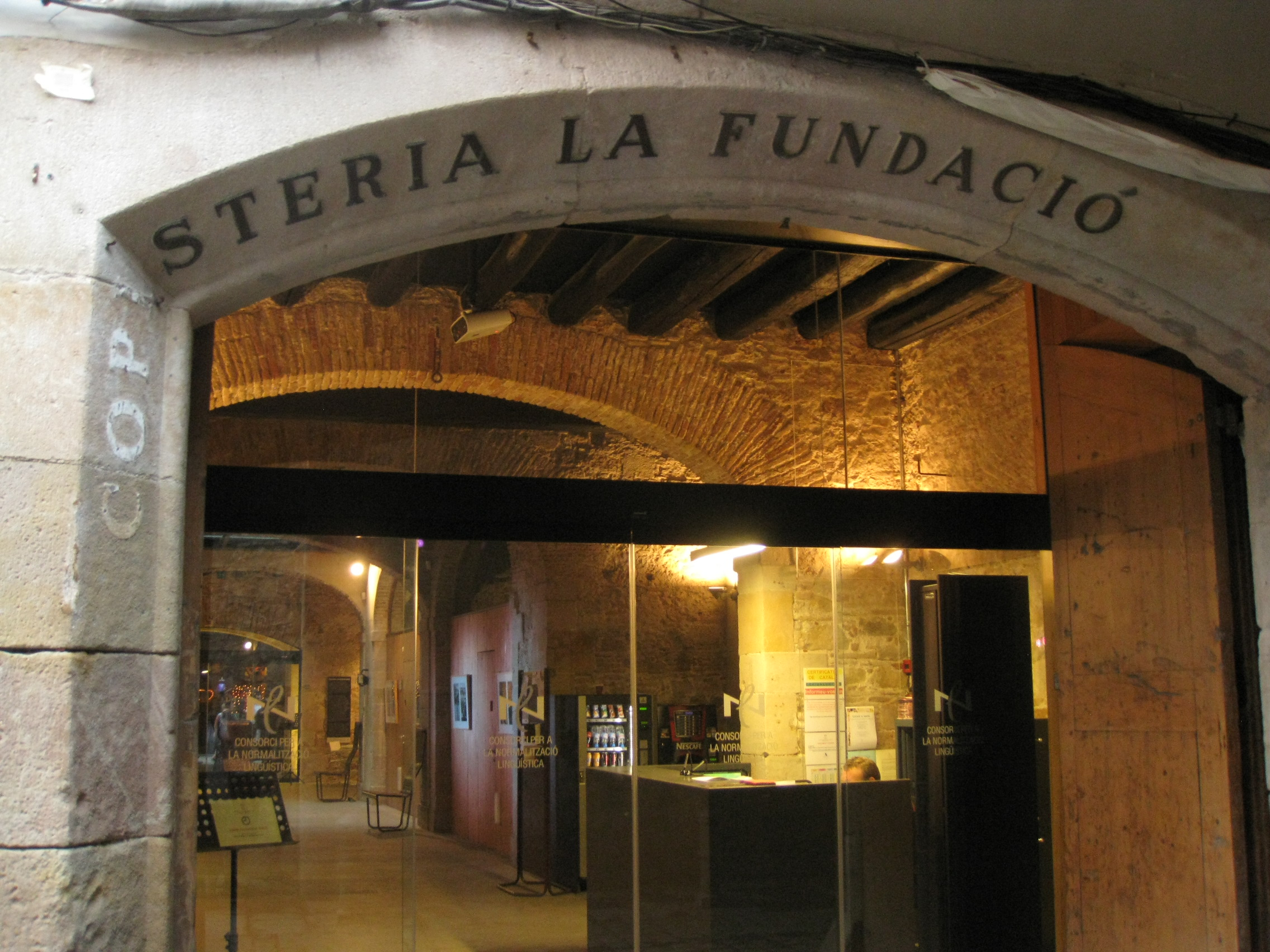 Edifici dels segles XVII-XVIII amb façana als carrers d'Avinyó núm. 52 i d'en Carabassa núm. 15, al barri Gòtic de Barcelona. A la imatge, l'entrada a l'edifci pel carrer d'en Carabassa, on al portal encara s'hi veu el nom de l'antic negoci que l'ocupava. Avui allotja el Consorci per a la Normalització Lingüística.